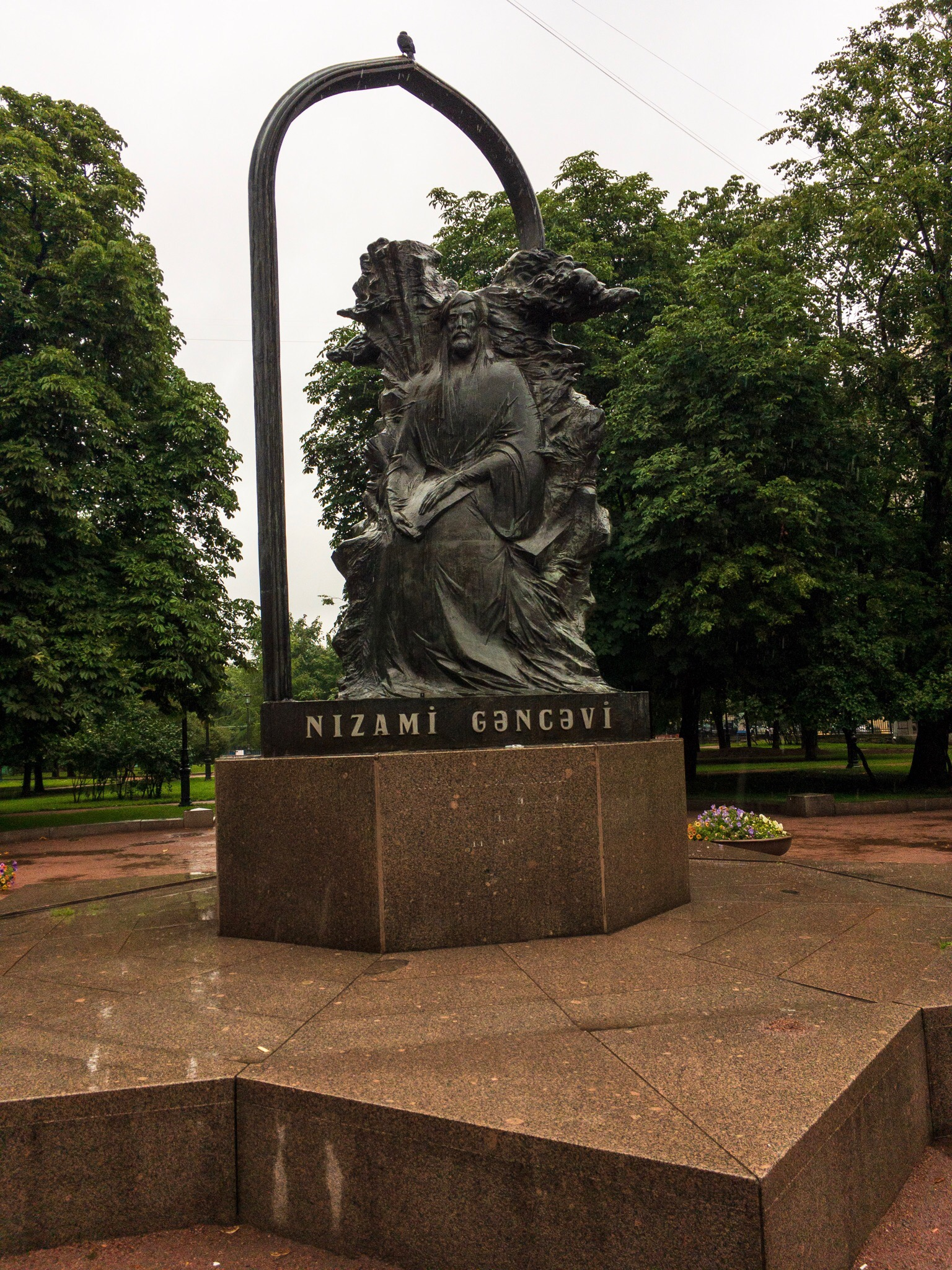 Памятник Низами в Петербурге на Каменноостровском проспекте